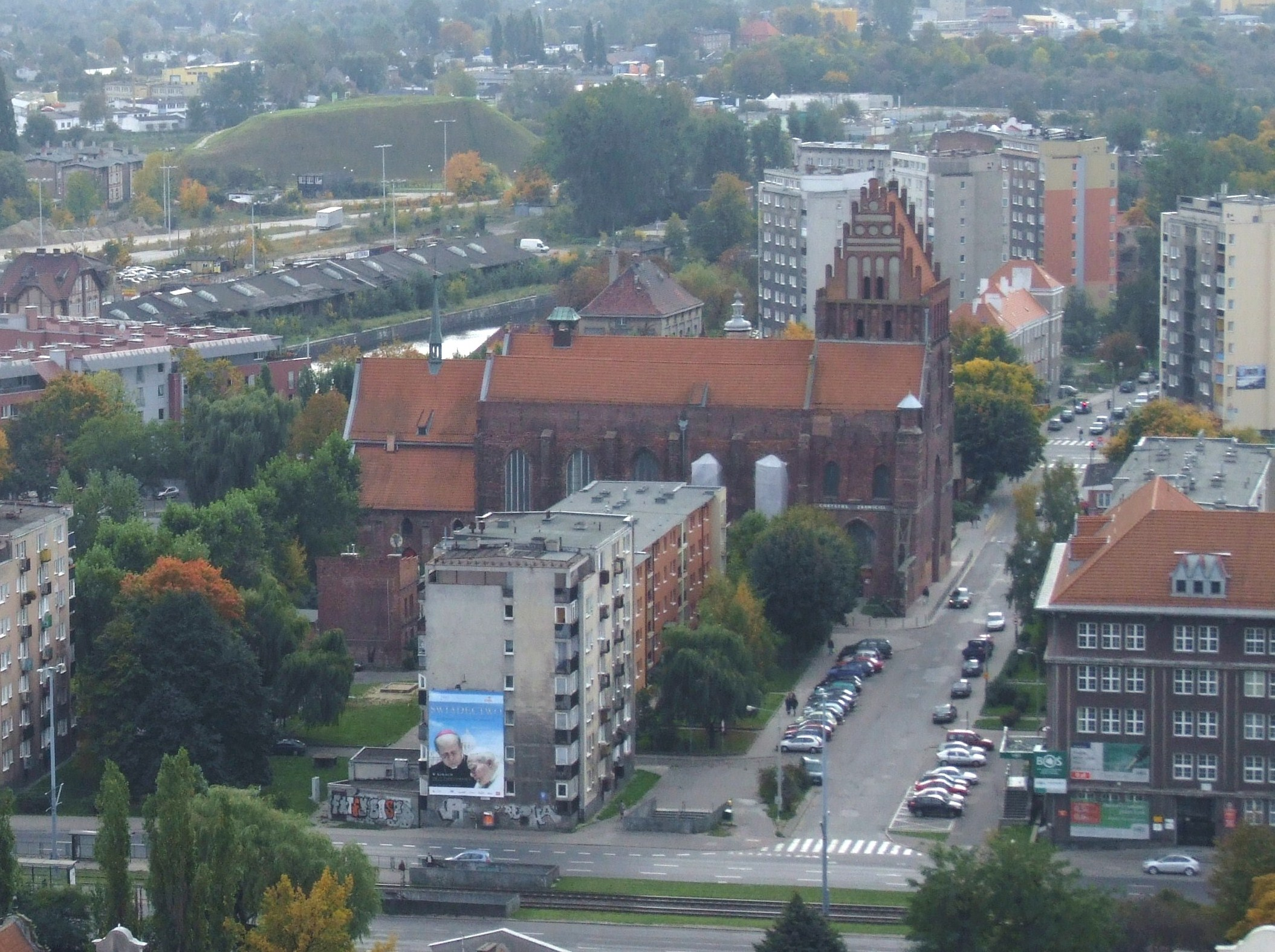 Stare Przedmieście, kościół św. Piotra i Pawła oraz ul. Żabi Kruk w Gdańsku.